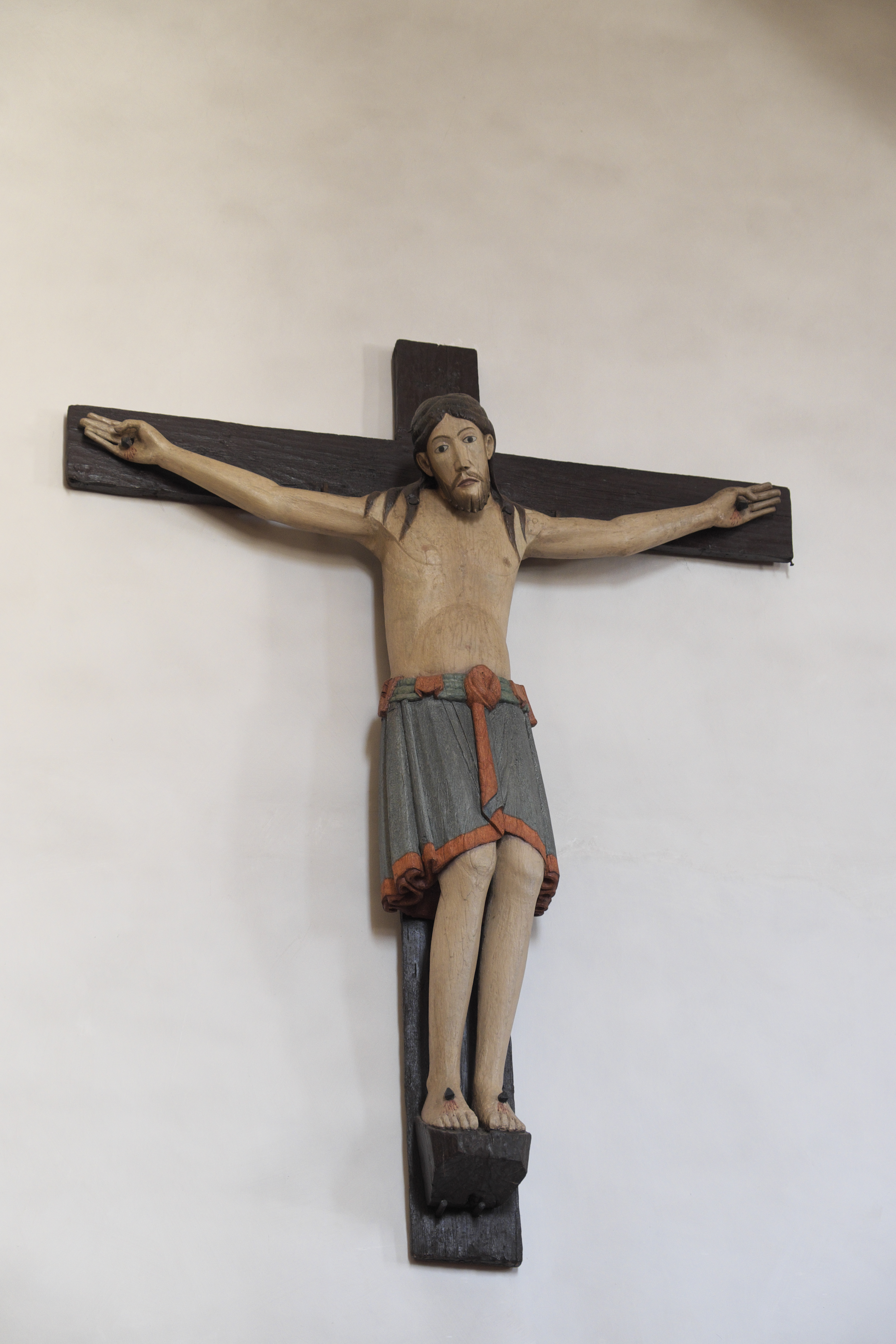 Heilig-Kreuz-Kirche in Schaftlach (Waakirchen) im Landkreis Miesbach (Bayern/Deutschland), Schaftlacher Kreuz